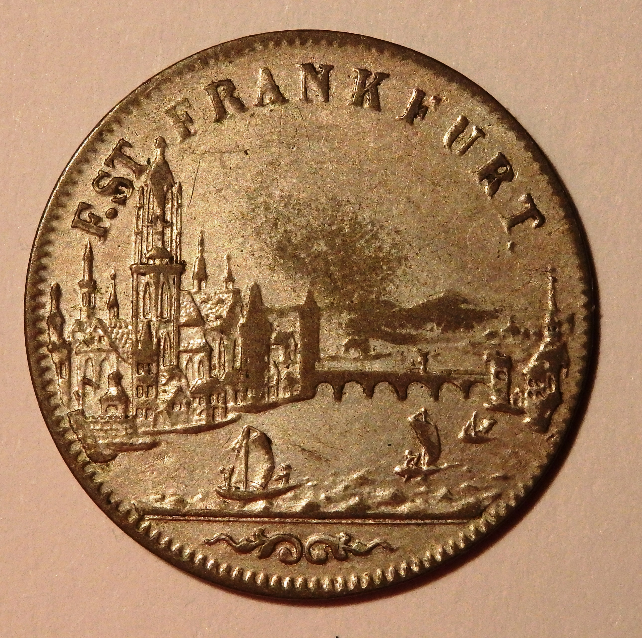 Stadtansicht von Frankfurt a.M. auf 6 Kreuzermünze von 1854, F.ST steht für Freie Stadt